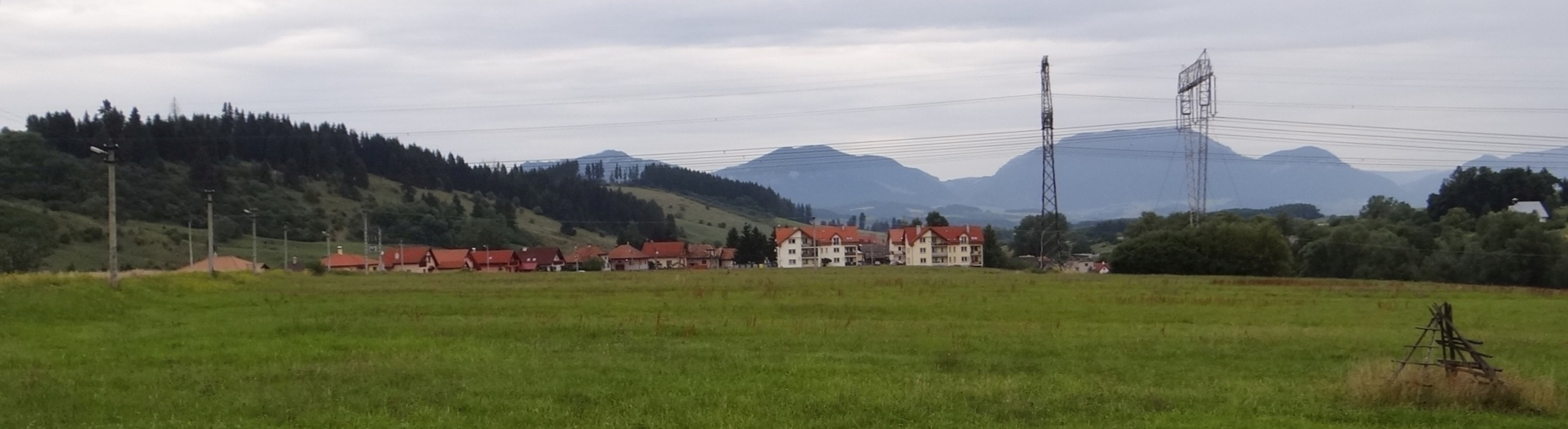 Gôtovany